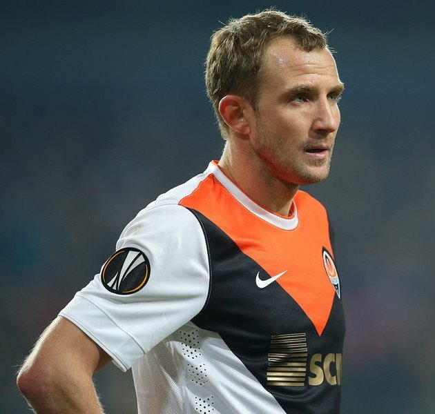 Олександр Кучер - футболіст Шахтаря (Донецьк)